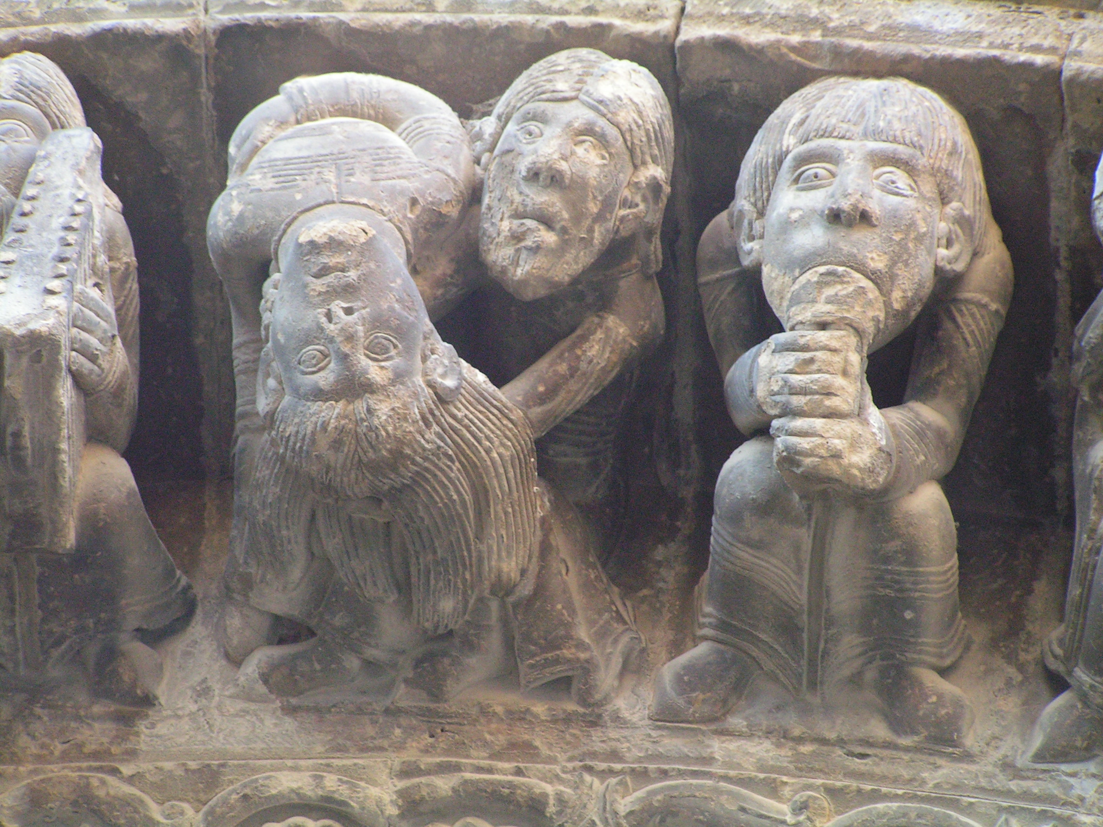 Aragonés: Detalle d'a portalada meridional d'a ilesia romanica de Santa María de Uncastiello, en as Zinco Billas d'Aragón. Ye una d'as primeras obras d'o clamato mayestro d'Agüero u mayestro de San Chuan d'a Peña.